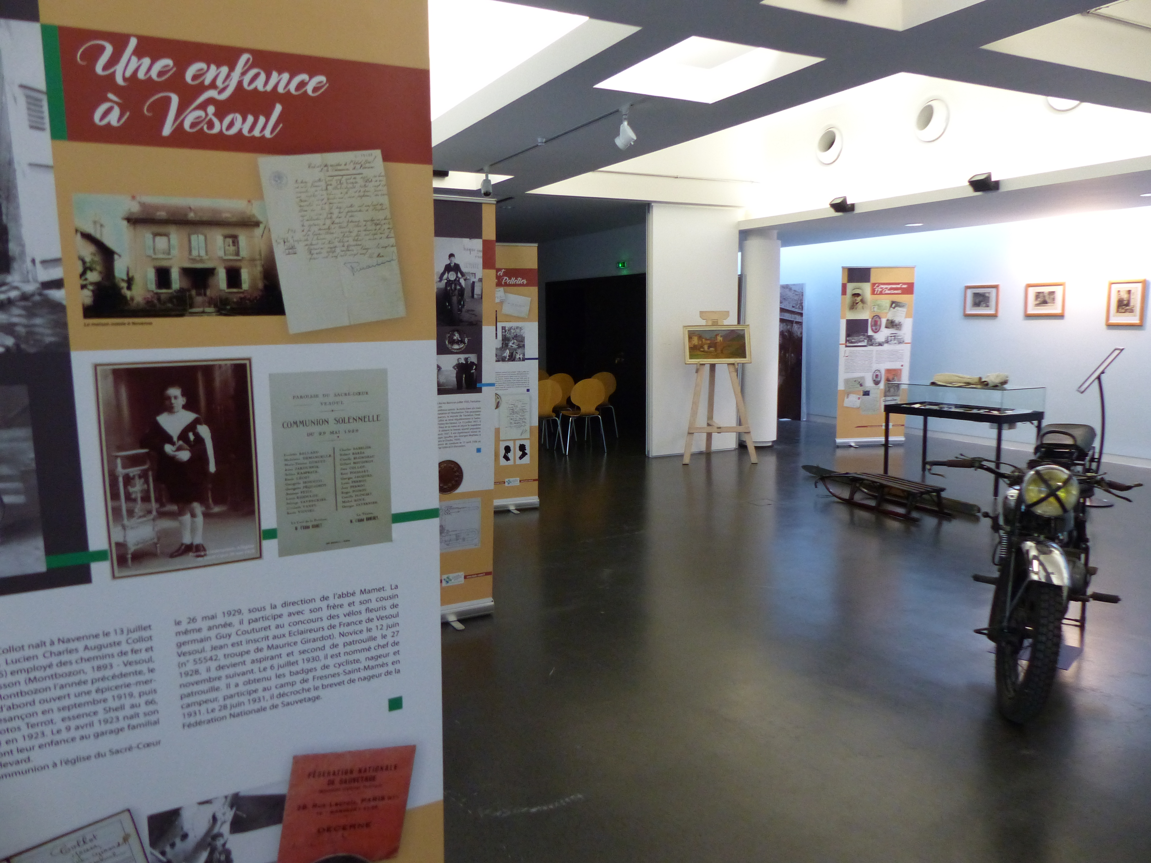 Une vue de l'exposition "Jean Collot 1917-1940 une existence vésulienne " aux Archives Départementales de la Haute-Saône (6 décembre 2017 - 6 avril 2018)